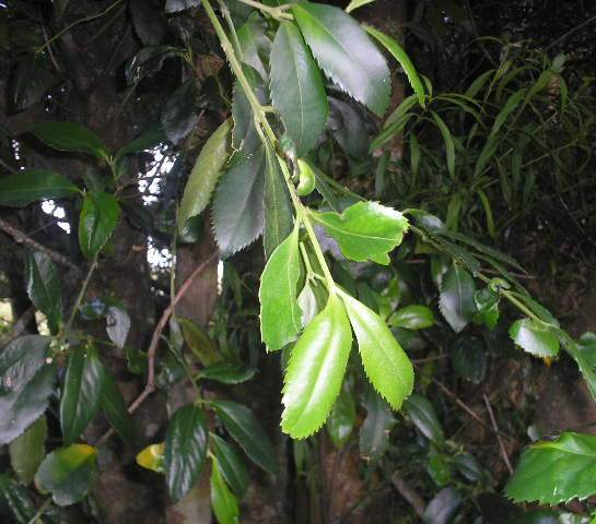 Hojas de laurel chileno {Laurelia sempervirens). Quinched, Chonchi, Chile.